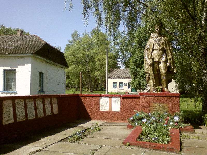 Братська могила воїнів Радянської Армії, які загинули у Другій світовій війні в селі Оливі Іванківського району